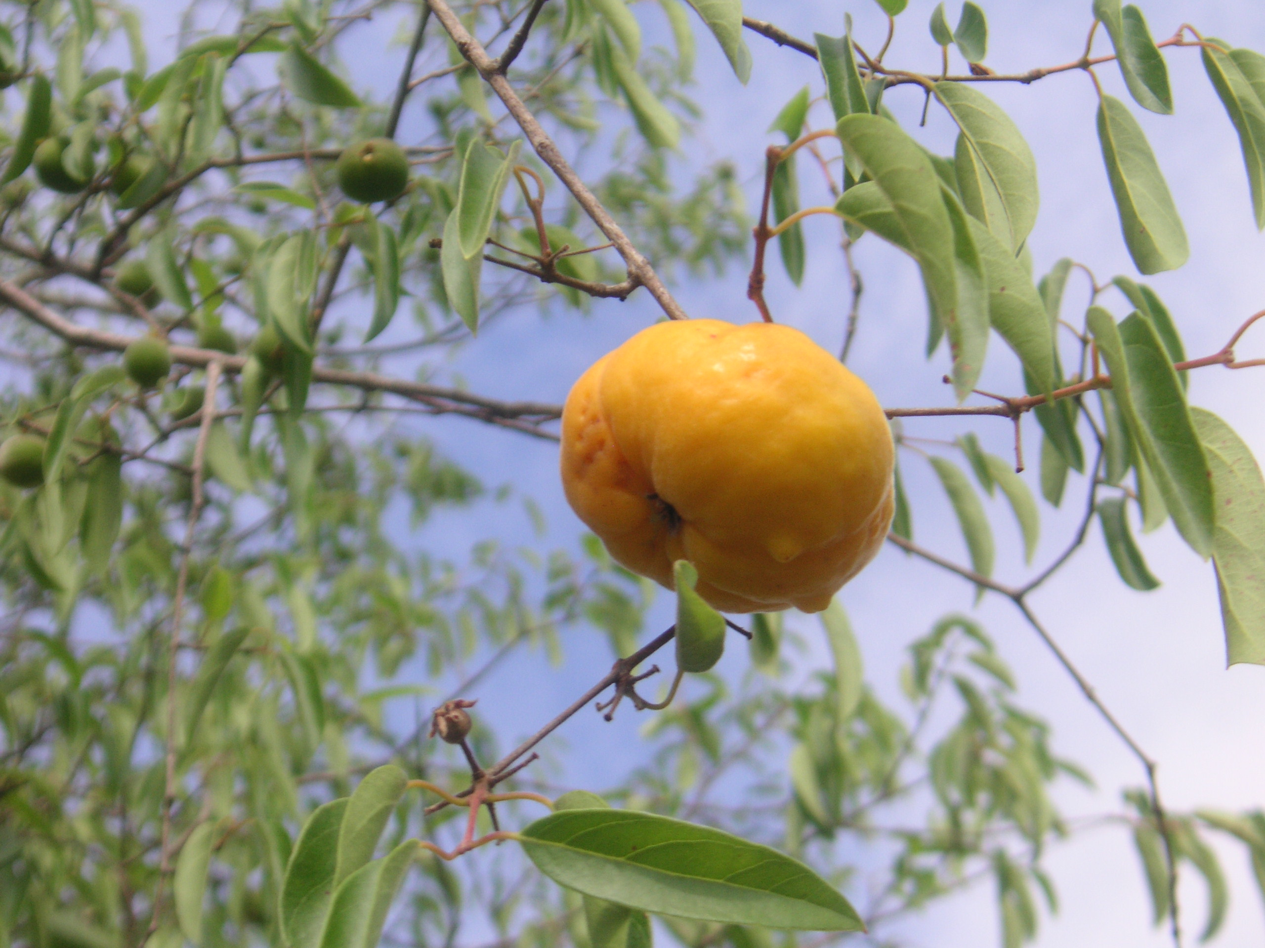 Fruta y hojas del Yva Jhái